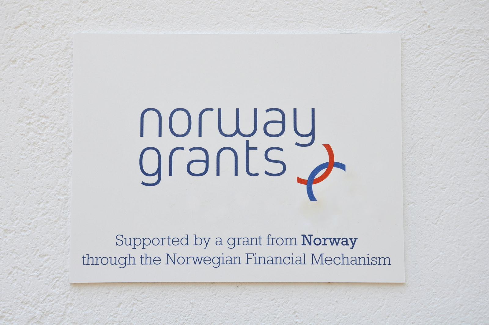 Plaque on a Calvary at Gödöllő (see it here), Hungary, describing the restoration was funded by the Norway Grants.